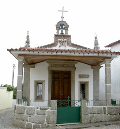 Capela de São Lourenço, Vilar de Andorinho, Rua de São Lourenço This building is classified as Sem protecção legal.